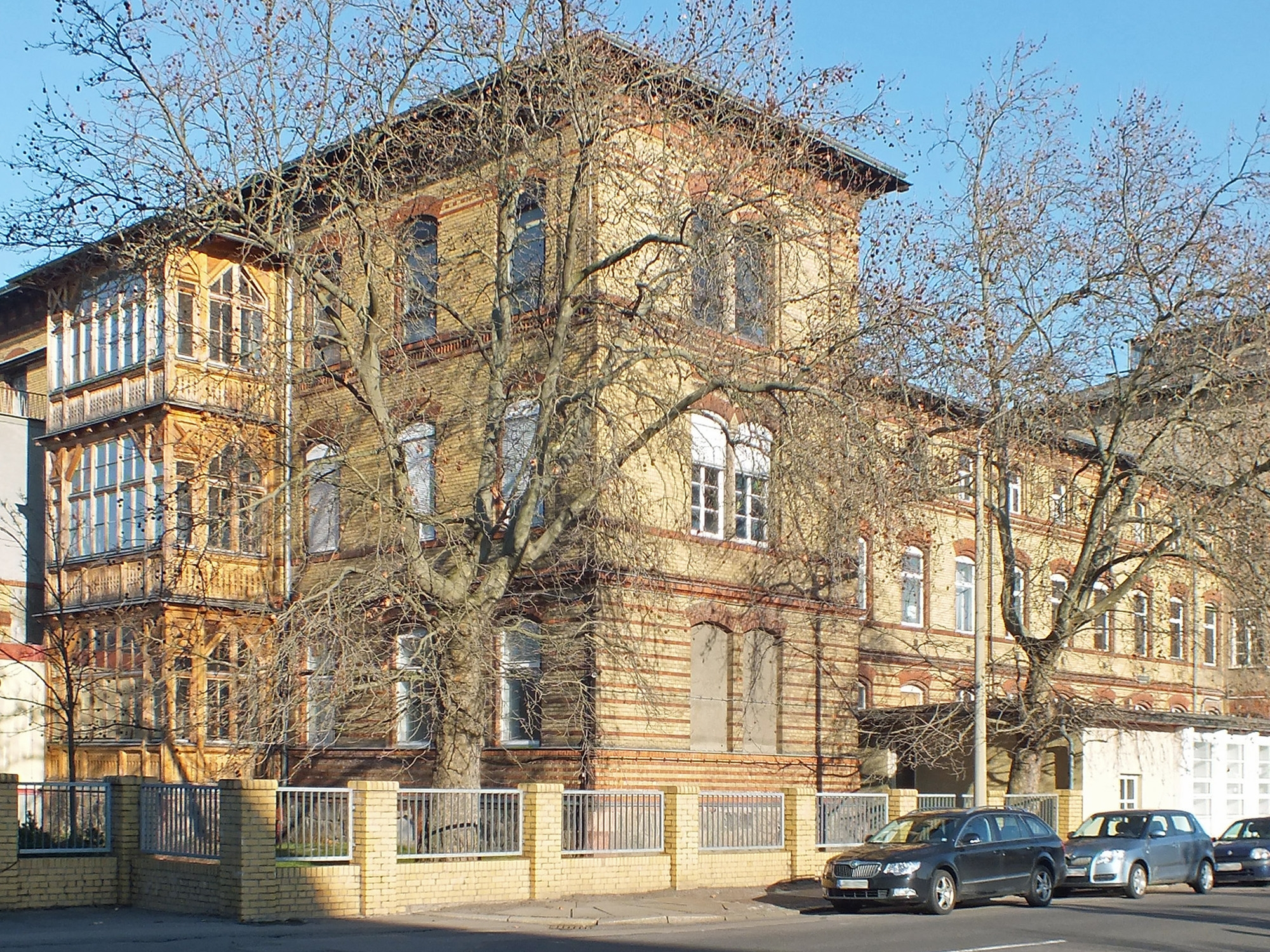 Das ehemalige Kinderkrankenhaus in der Oststraße in Leipzig